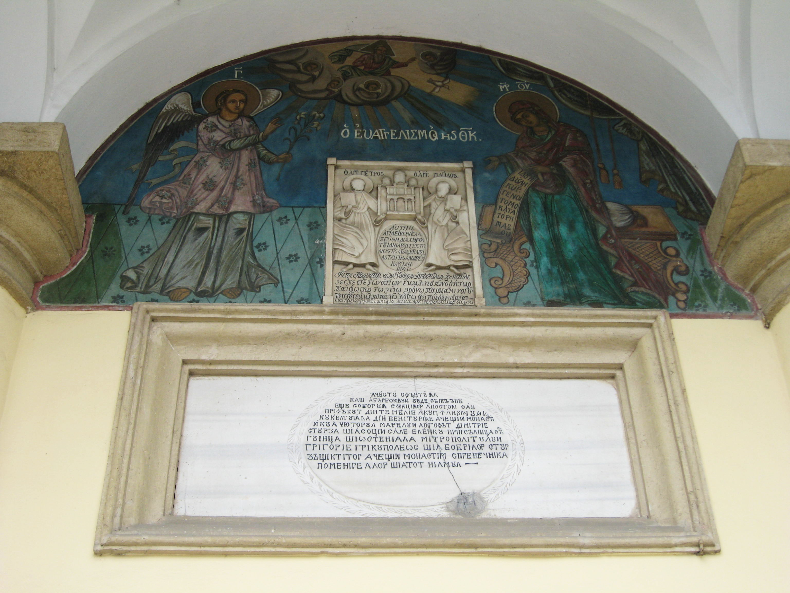 Biserica Bărboi din Iași